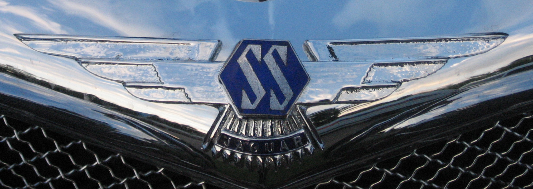 Jaguar SS 100